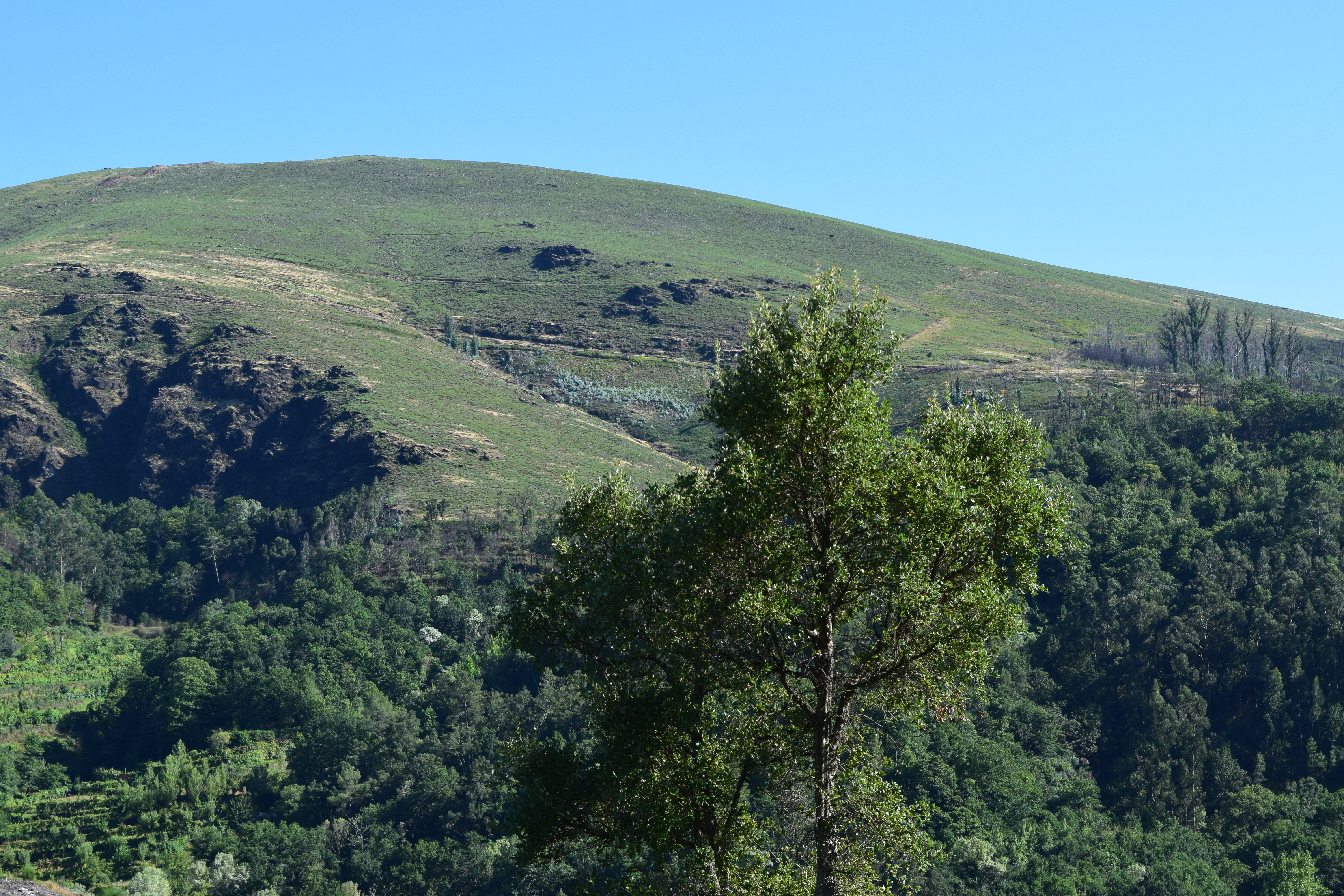 Parque Natural do Alvão 4 This is a photography of a Site of Community Importance in Portugal with the ID: PTCON0003. Natura2000 entry, EEA entry